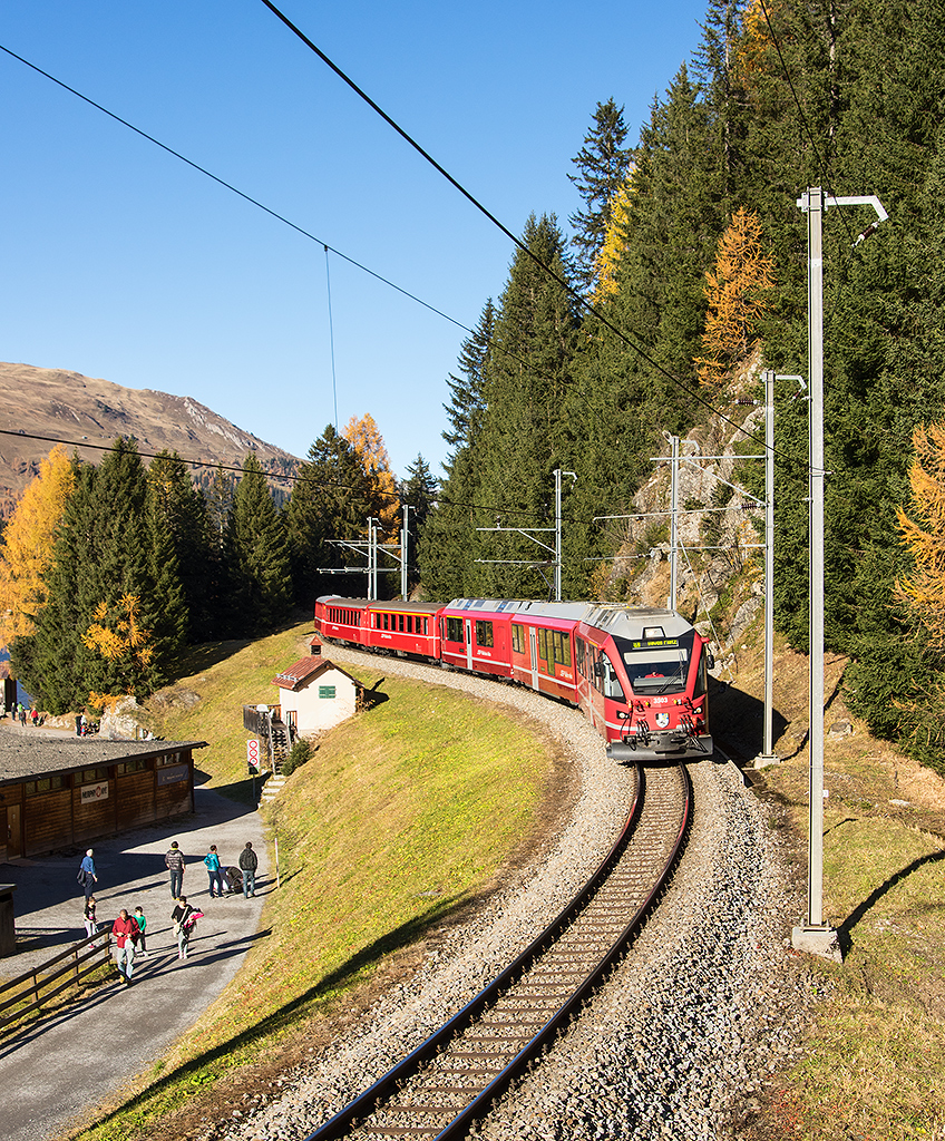 Allegra ABe 8/12, Davos Wolfgang - Davos Dorf, 31.10.2015